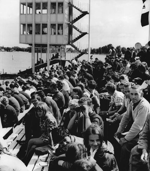 Beetzsee, Ruderregatta, Publikum Zentralbild Franke 18.7.70 Brandenburg (Havel): DDR-Meisterschaften im Rudern- Blick auf die Zuschauertribüne am Ziel der Regattastrecke Beetzsee. Im Hintergrund der moderne Zielrichterturm.